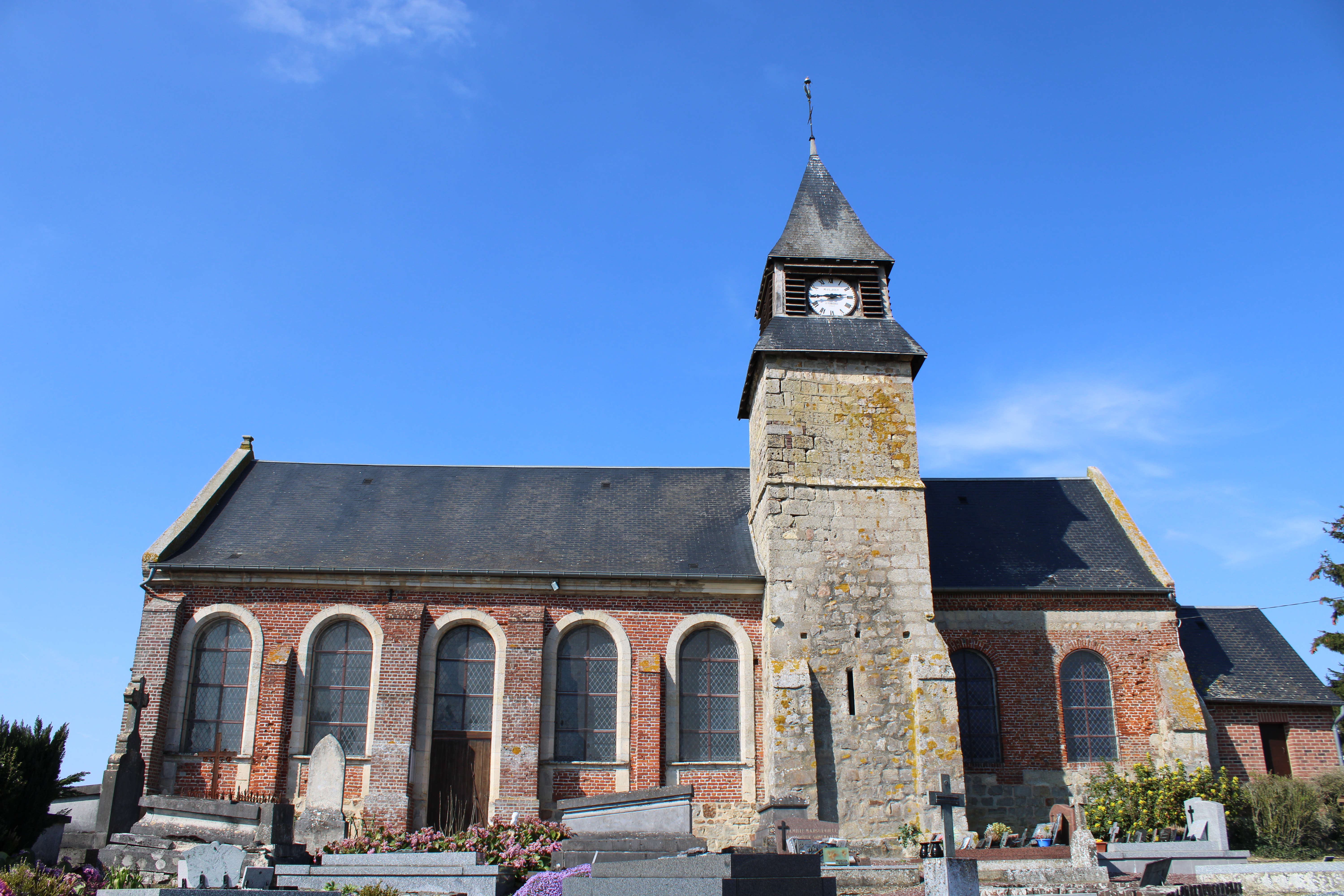 L'église.